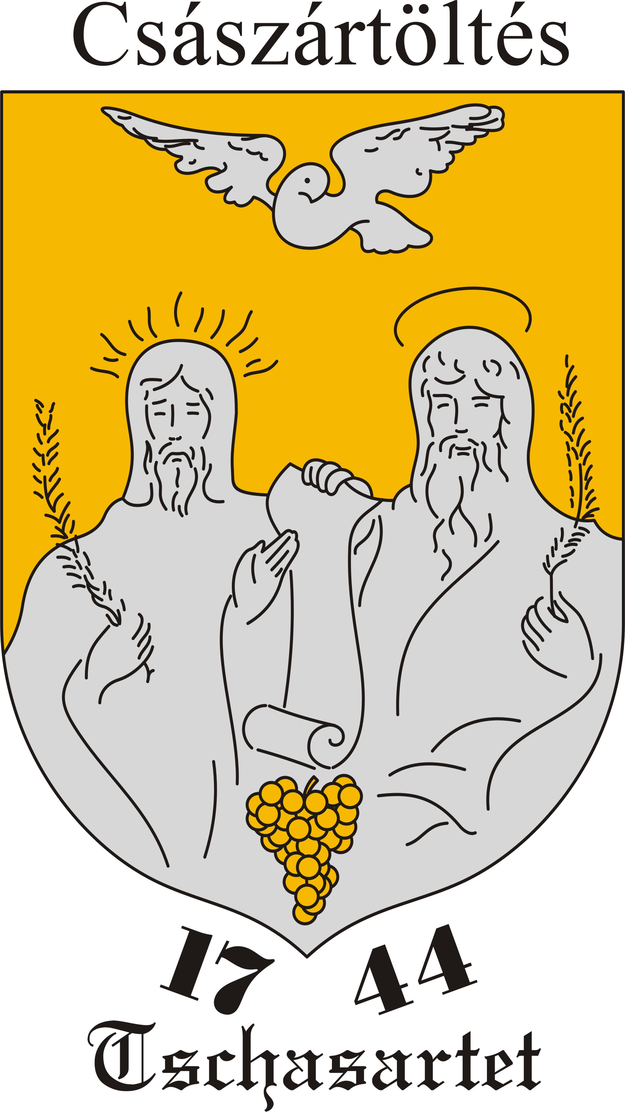 Coat of arms of Császártöltés (Tschasartet or Kaiserdamm), Hungary